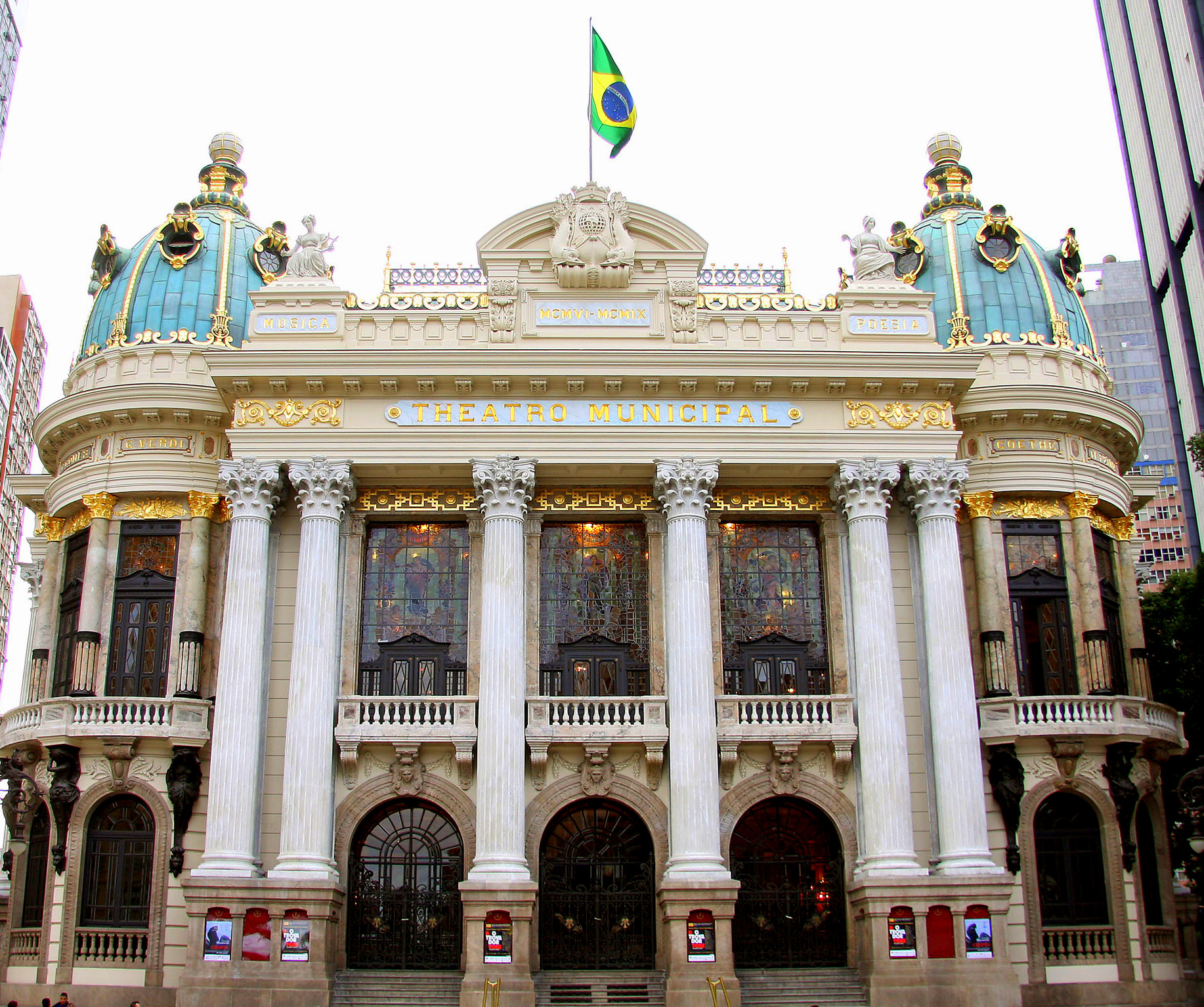 fachada theatro municipal do rio de janeiro